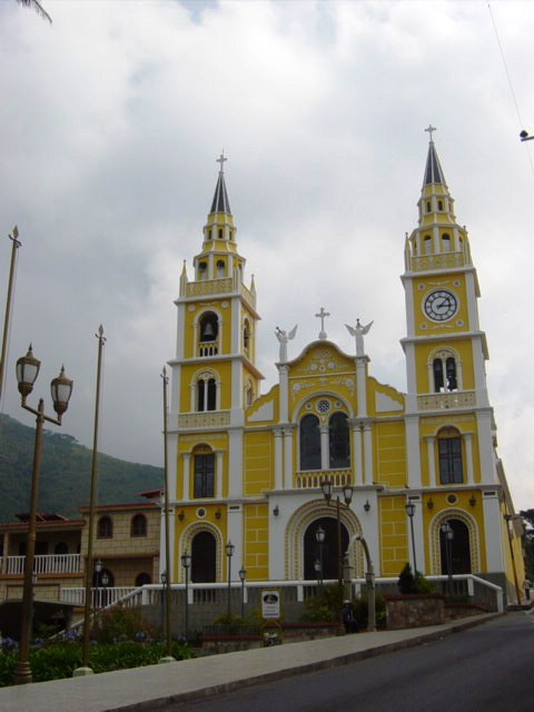 Iglesia católica de Bailadores, Estado Mérida, Venezuela.